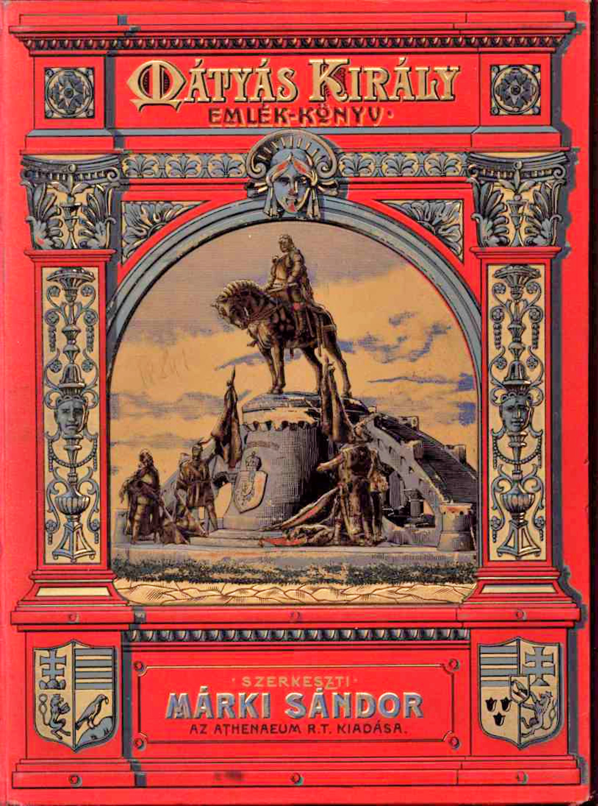 Borítólap Mátyás király emlékkönyv kolozsvári szobrának leleplezése alkalmára. Szerk. Márki Sándor. Budapest: Atheneum. 1902.